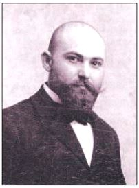 Снимка на д-р Дамян Иванов